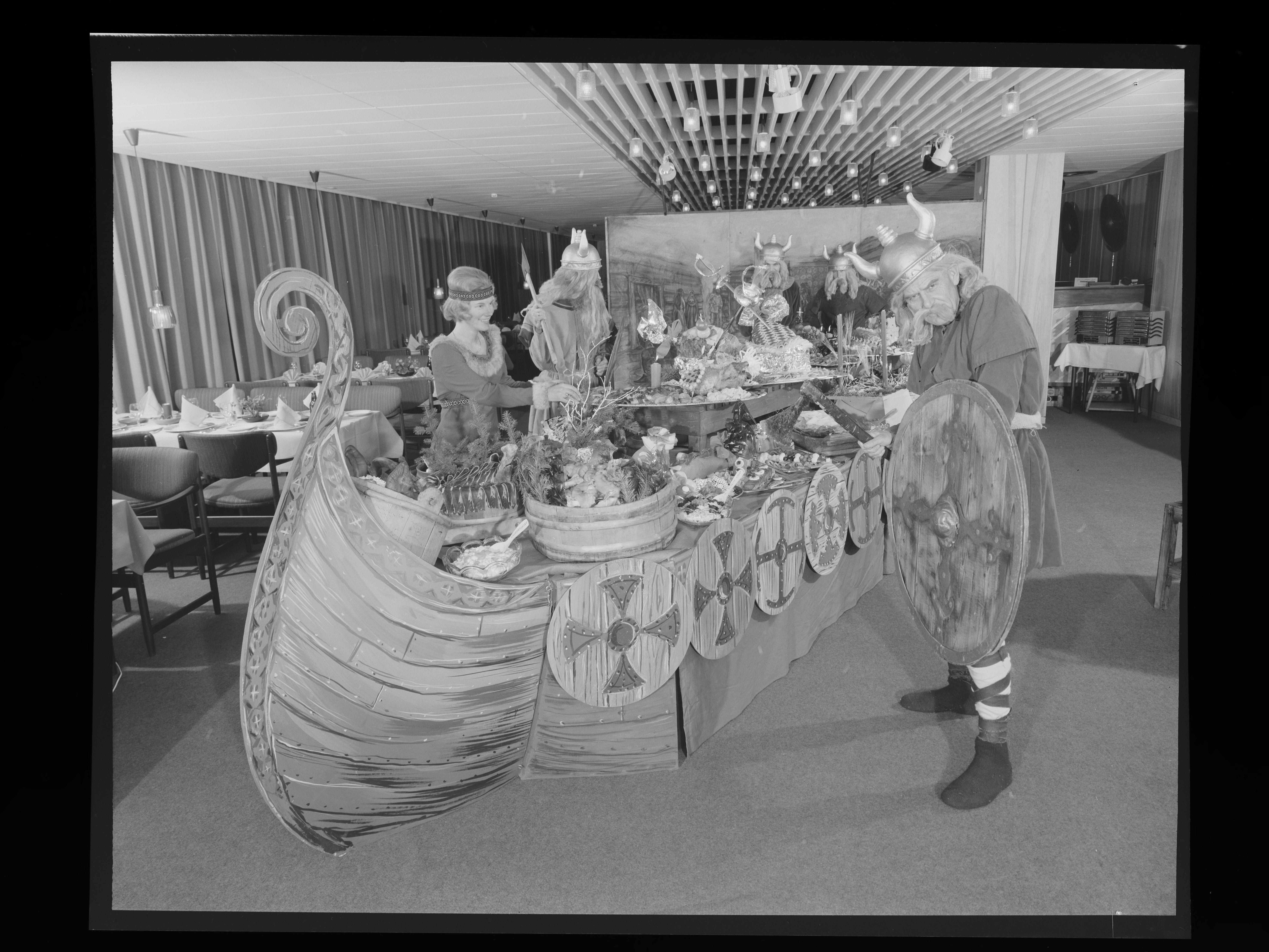 Bildet er hentet fra Nasjonalbibliotekets bildesamling Fagernes,Valdres, Nord-Aurdal, Oppland